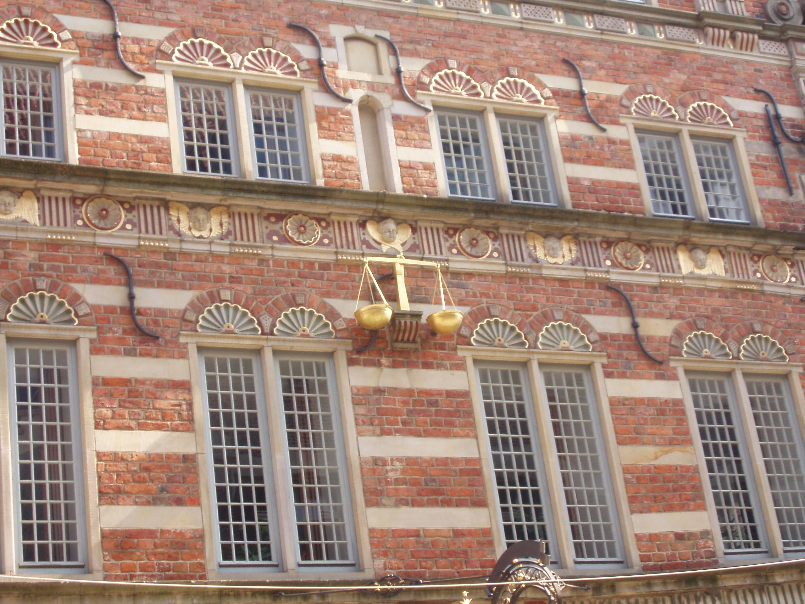 Fassade der Bremer Stadtwaage, Detail